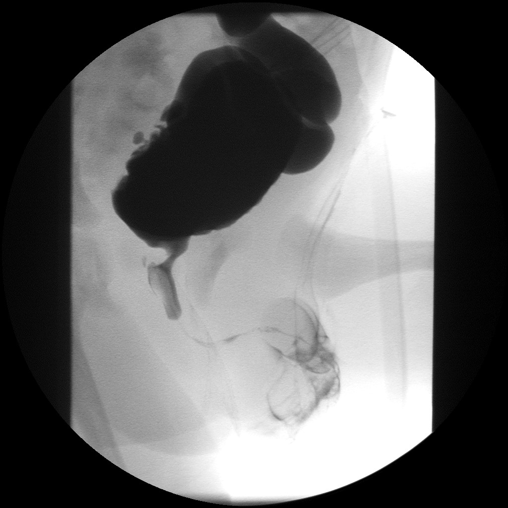 Subvesikale Obstruktion durch Urethralklappe